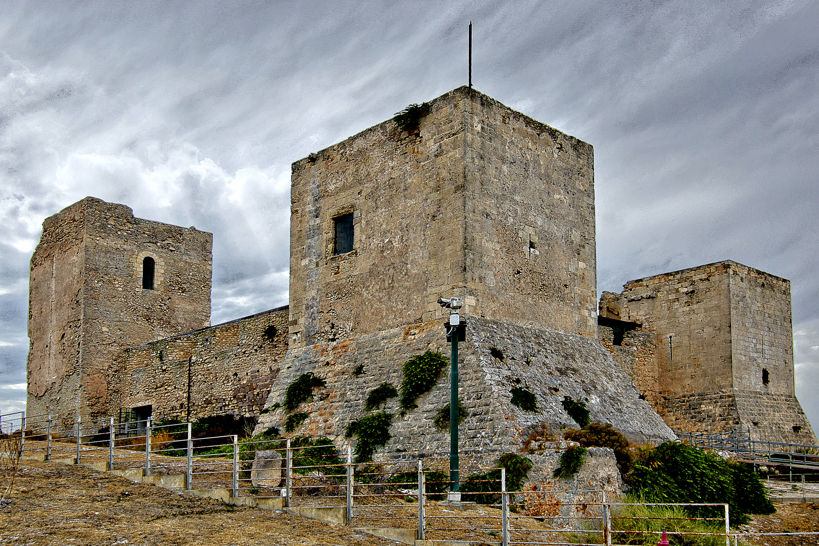 Castello di San Michele, Cagliari, e parte delle fortificazioni di Santa Igia